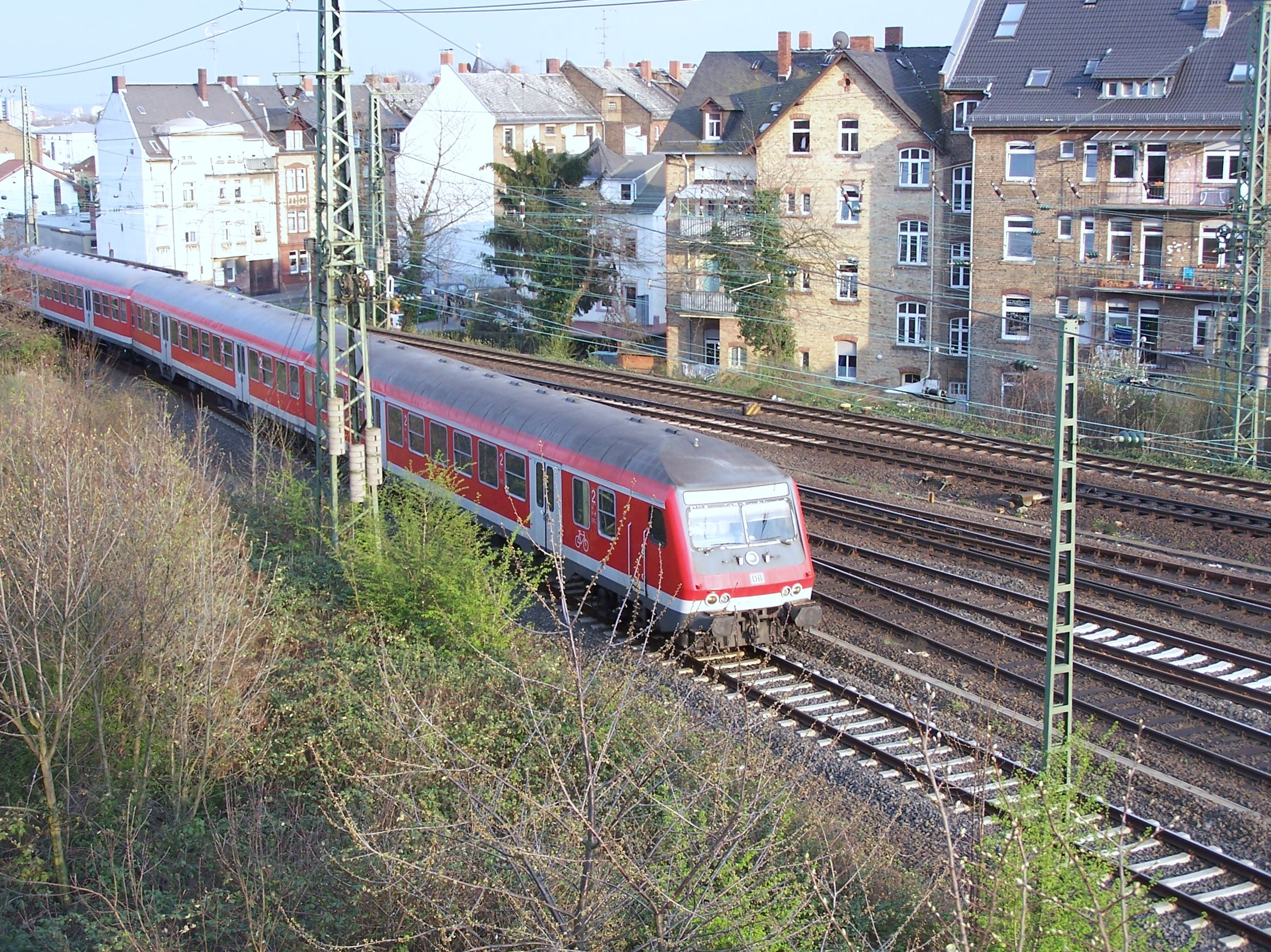 Ein Zug der Main-Lahn-Bahn (RB-Linie 20) am Gleisdreieck Höchst (Königsteiner Straße)